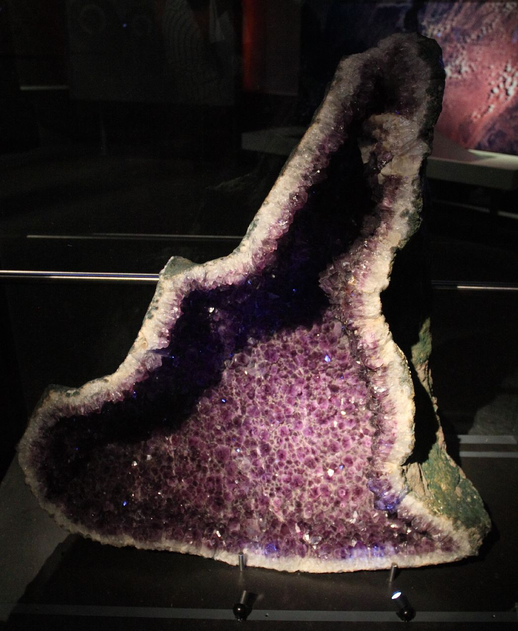 Geode amethist In het kader van "Wiki loves art NL".